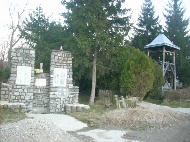 Description Memorial fontaine et clocher a Vošanovac Dateune annéeSourceSelf-photographedAuthorIvan IvkovicPermission (Reusing this file) (facultatif si vous spécifiez une licence dans la liste déroulante) Other versions (facultatif s'il n'y a pas d'autres versions de l'image) Memorial fontaine et clocher a Vošanovac